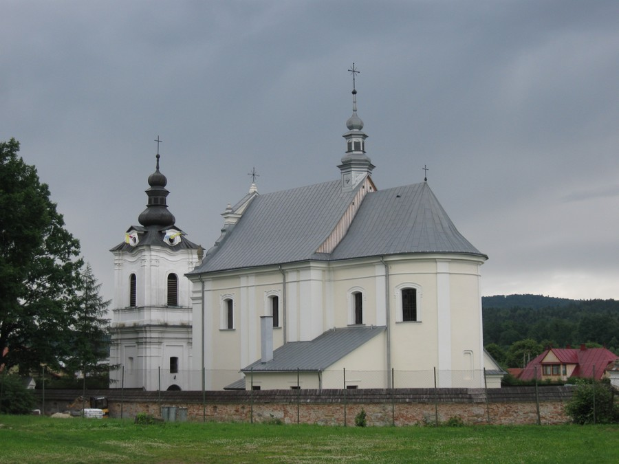 Uherce Mineralne, kościół